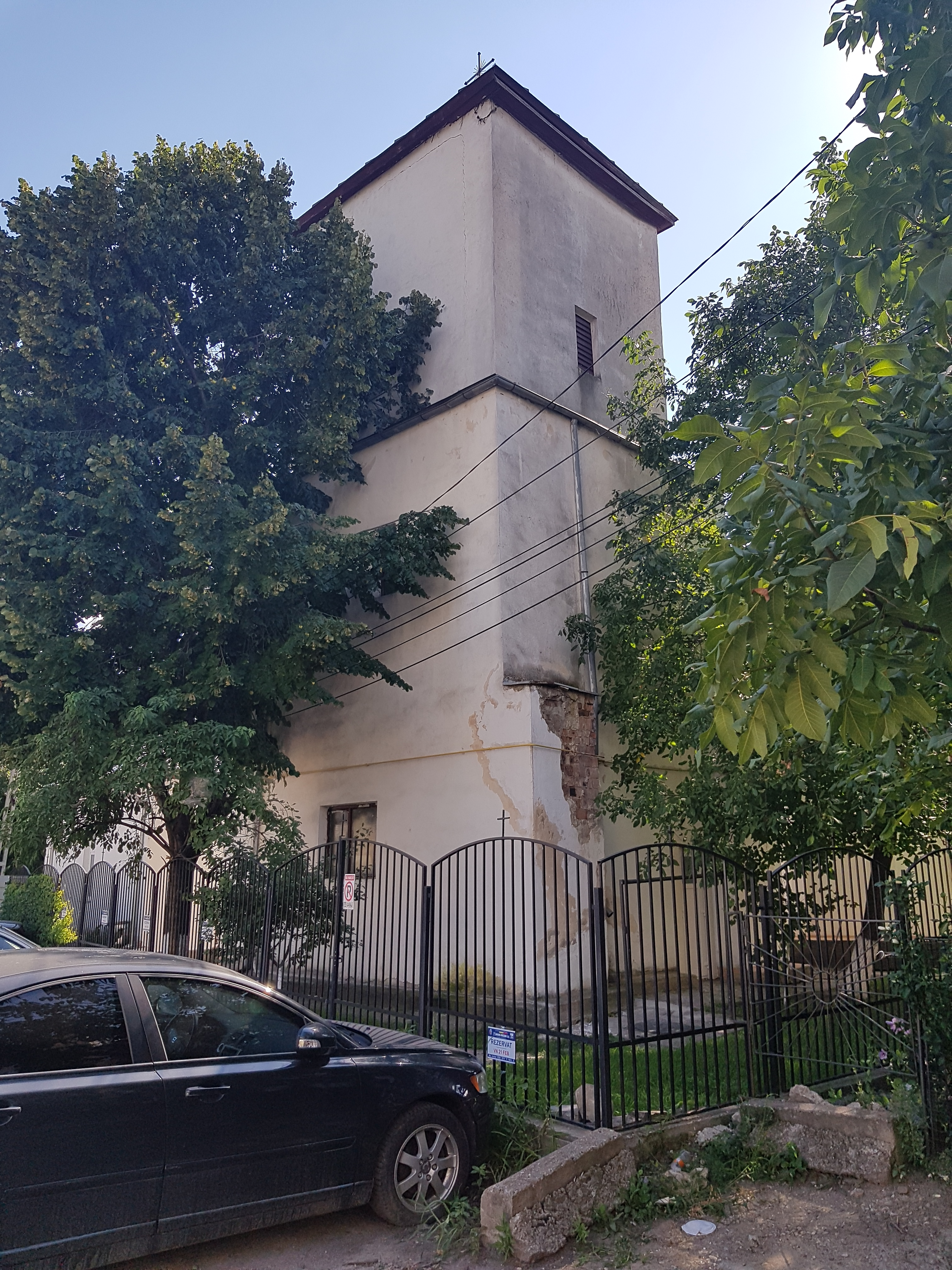 Clopotniță 02